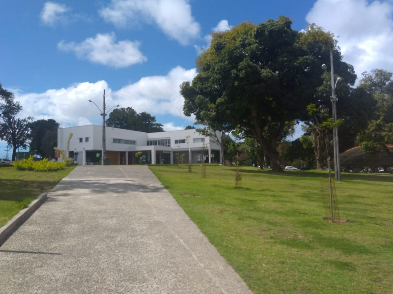 Interior das instalações do Campus Cabula da Escola Bahiana de Medicina e Saúde Pública, Salvador - BA